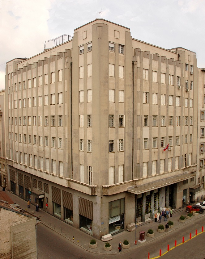 Српски (ћирилица): Студентски трг 13, Београд